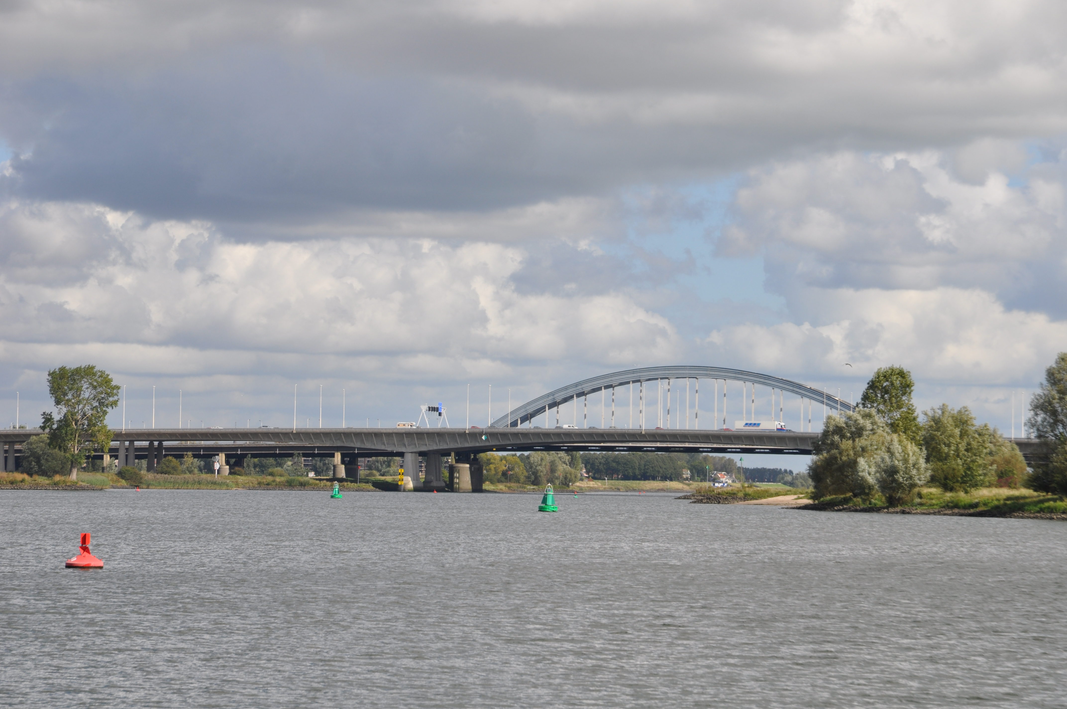 Rijksweg 2 (A2) over de Lek, nabij IJsselstein.